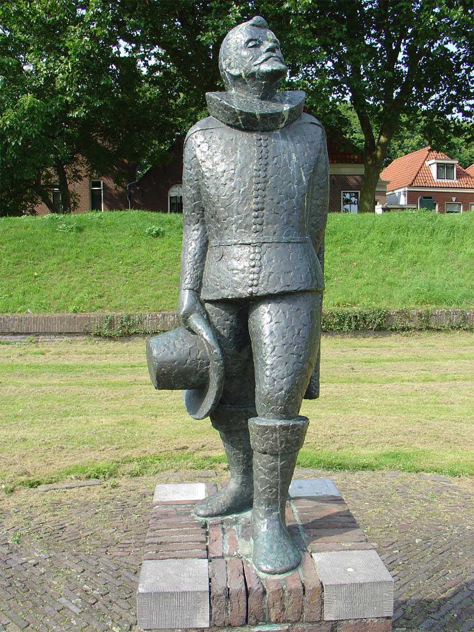 Olivier van Noort door Jan van Ipenburg - Buiten de Veerpoort Schoonhoven